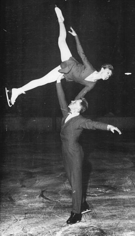 Ludmilla Belousoca, Oleg Protopopow Zentralbild Gahlbeck Wen-Gro 18.3.1963 Sowjetisches Eiskunstlaufpaar in der DDR Am 16.3.1963 fand im Kunsteisstadion in Karl-Marx-Stadt ein Eiskunstlaufschaulaufen mit den Zweiten bei den Welt- und Europameisterschaften 1963 im Paarlaufen, Ludmilla Belousoca-Oleg Protopopow statt. UBz: Das sowjetische Paar bei ihrer Kür.